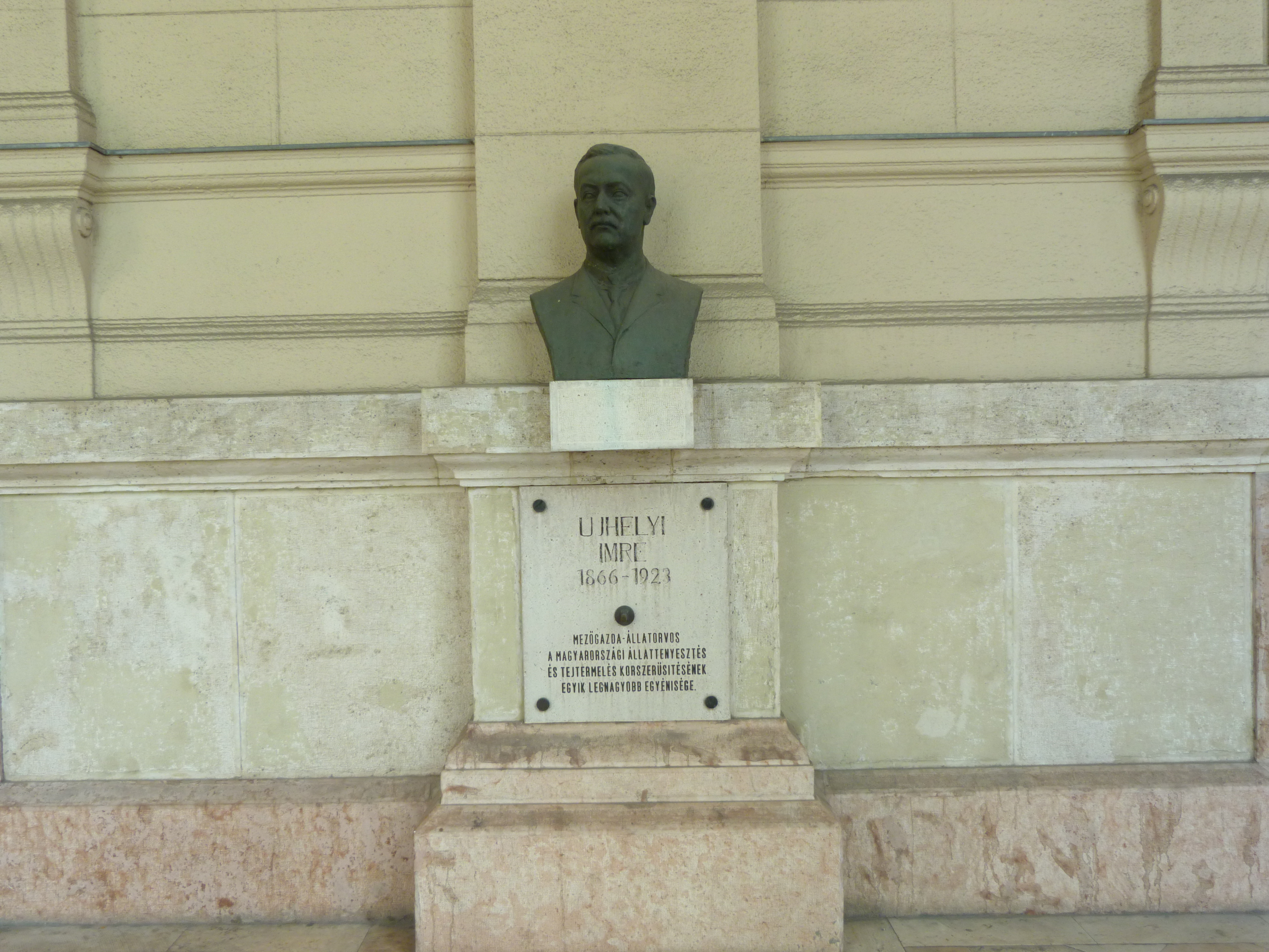 A felvétel 2012. május 19 -én készült Budapesten, a Kossuth téren. Újhelyi Imre.